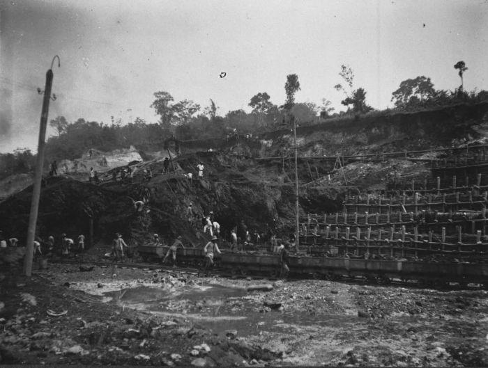 Foto. De Boekit Asem steenkoolmijnen